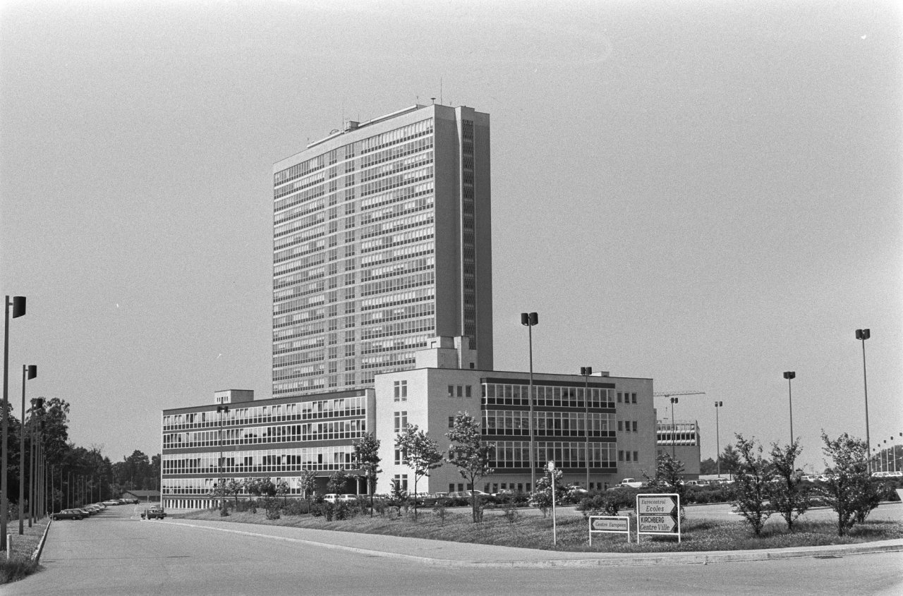 Fotocollectie Stadsgezichten Luxemburg: Centre européen